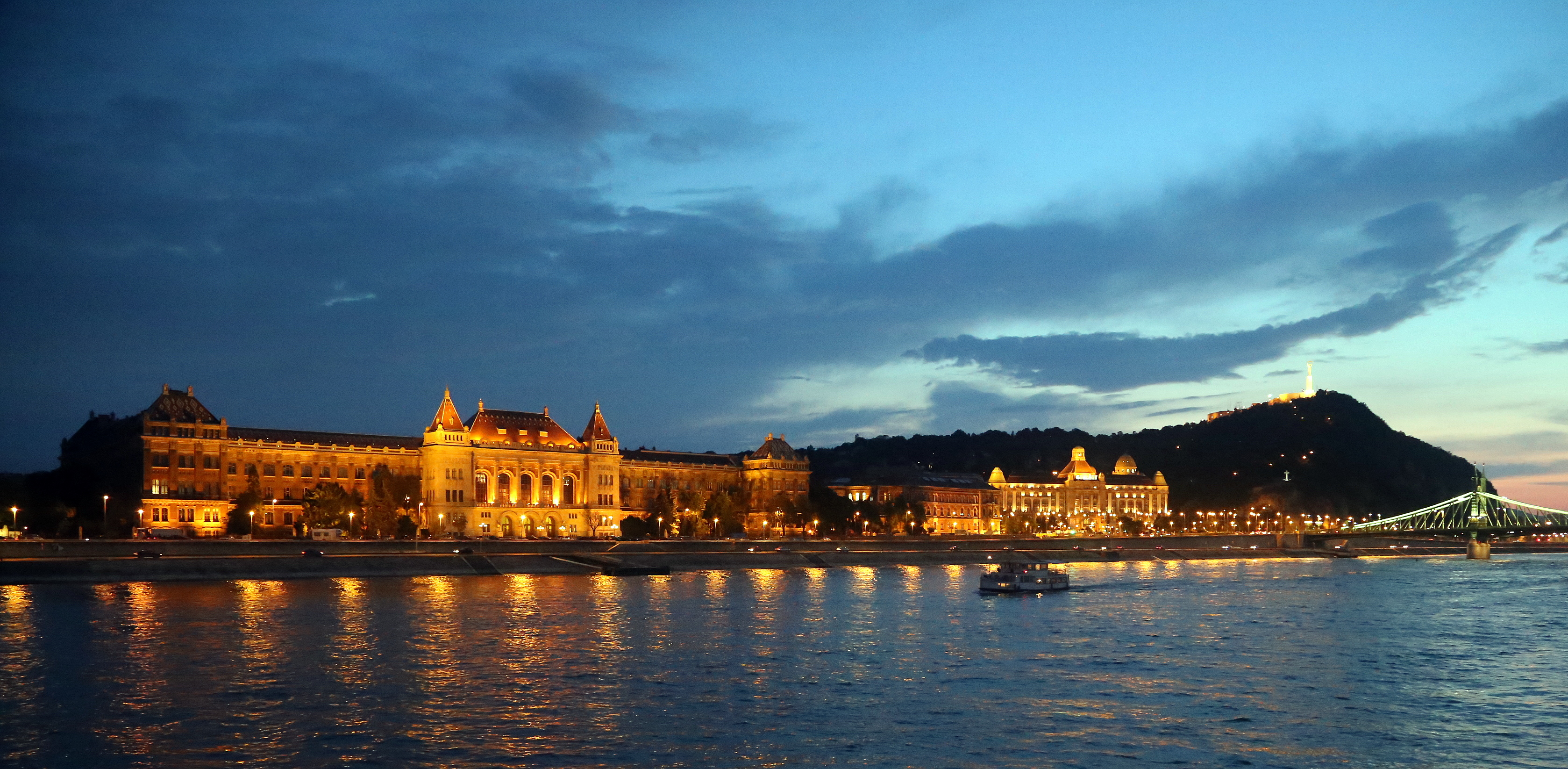 Budapesti Műszaki Egyetem K épülete és a Gellért szálló This is a photo of a monument in Hungary. Identifier: 1110 This is a photo of a monument in Hungary. Identifier: 1112